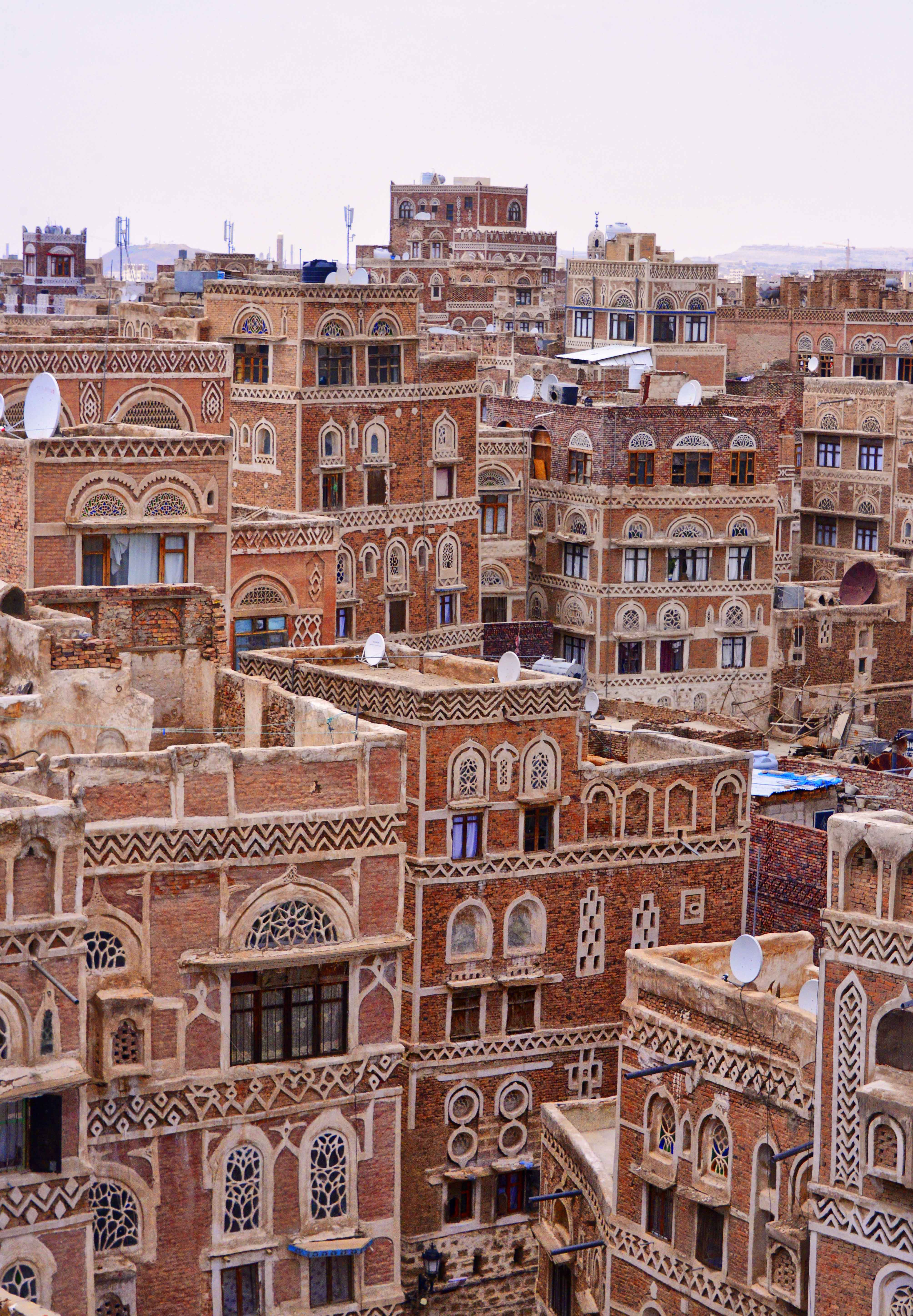 Old Sana'a, Yemen